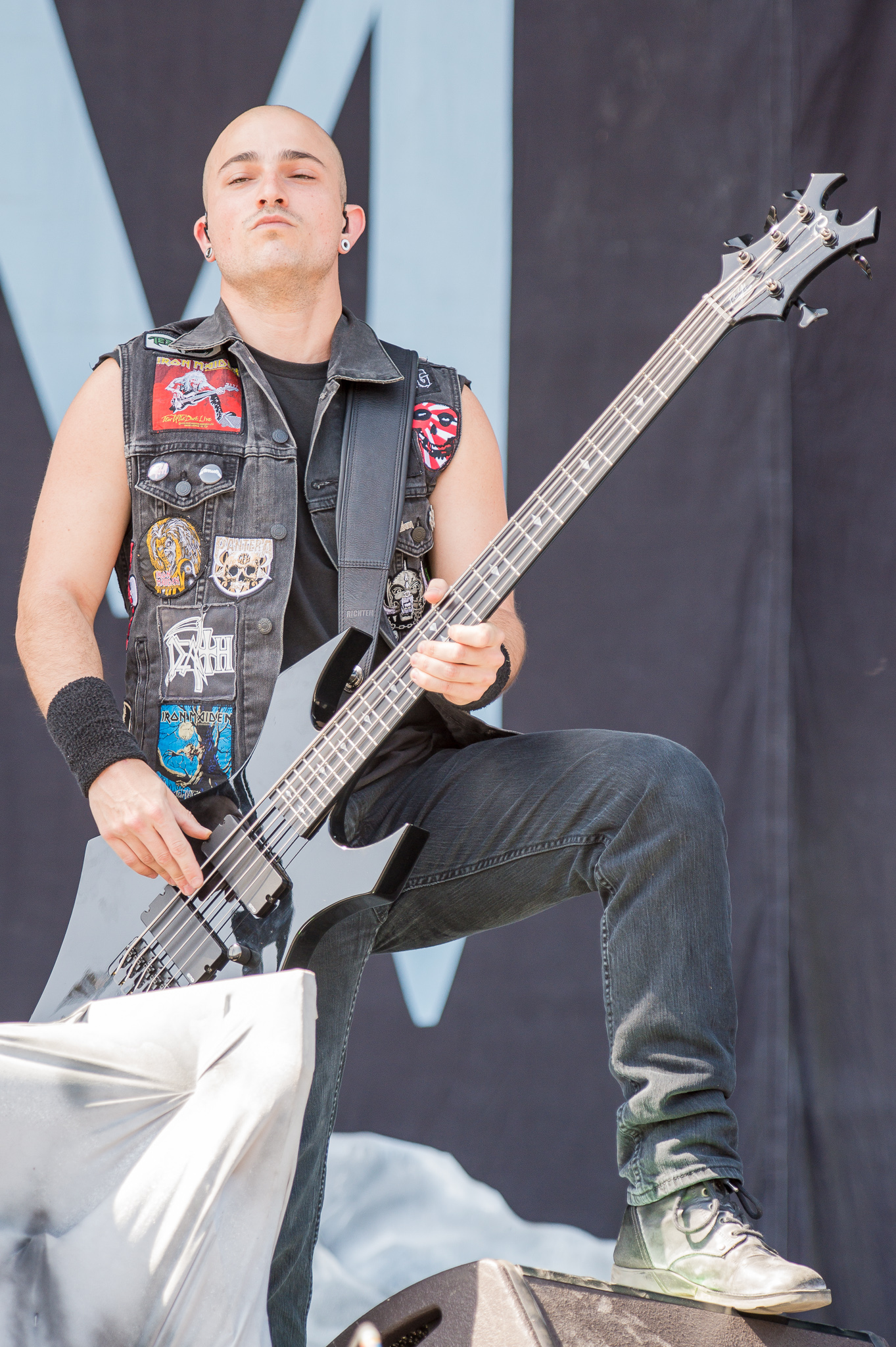 ARGO-Konzerte,Centerstage,Konzert,Livekonzert,Livemusik,Musik,Paolo Gregoletto,RiP,Rock im Park 2014,Trivium